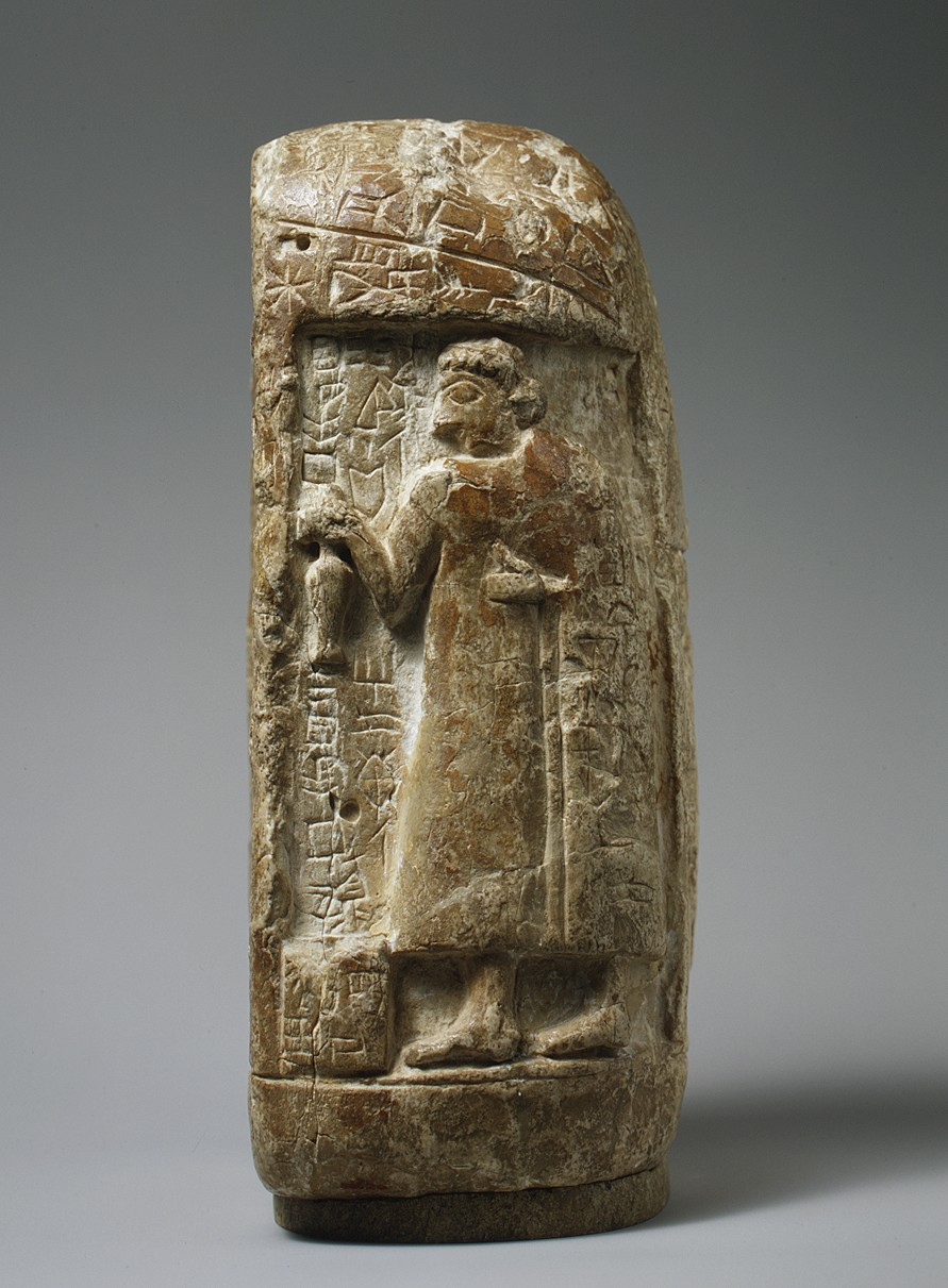 Sumerian; Relief; Stone-Reliefs-Inscribed